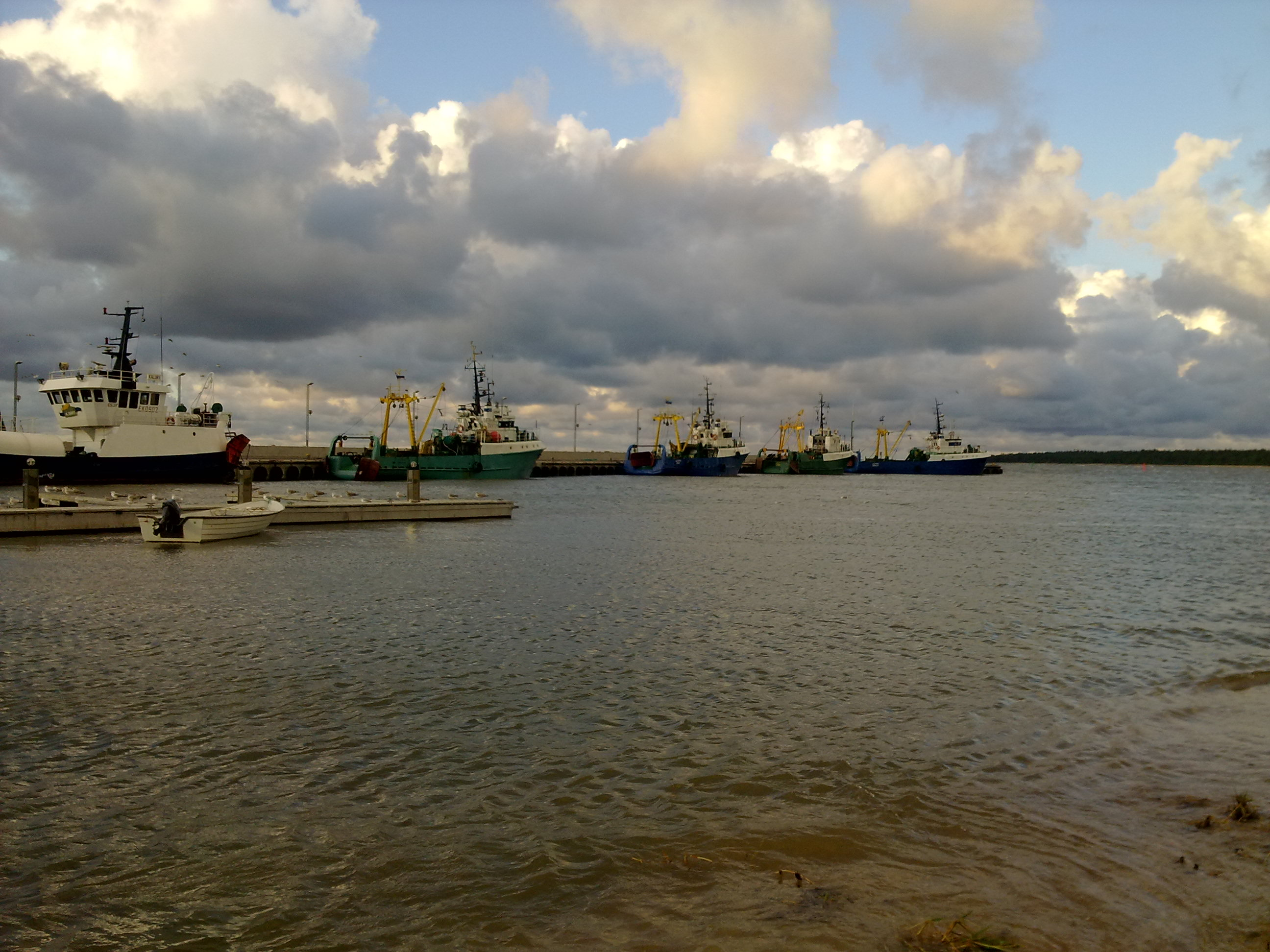 Kalapüügitraalerid Dirhami sadamas